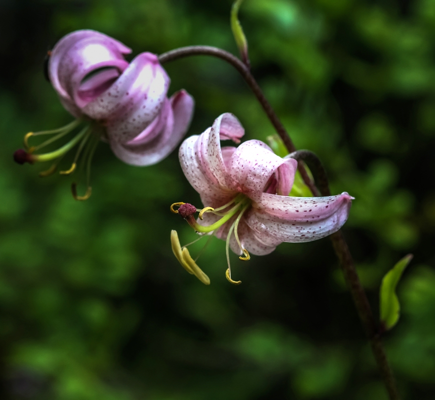 Slowenien, Julische Alpen: Botanischer Garten Alpinum Juliana in Trenta: Lilium martagon